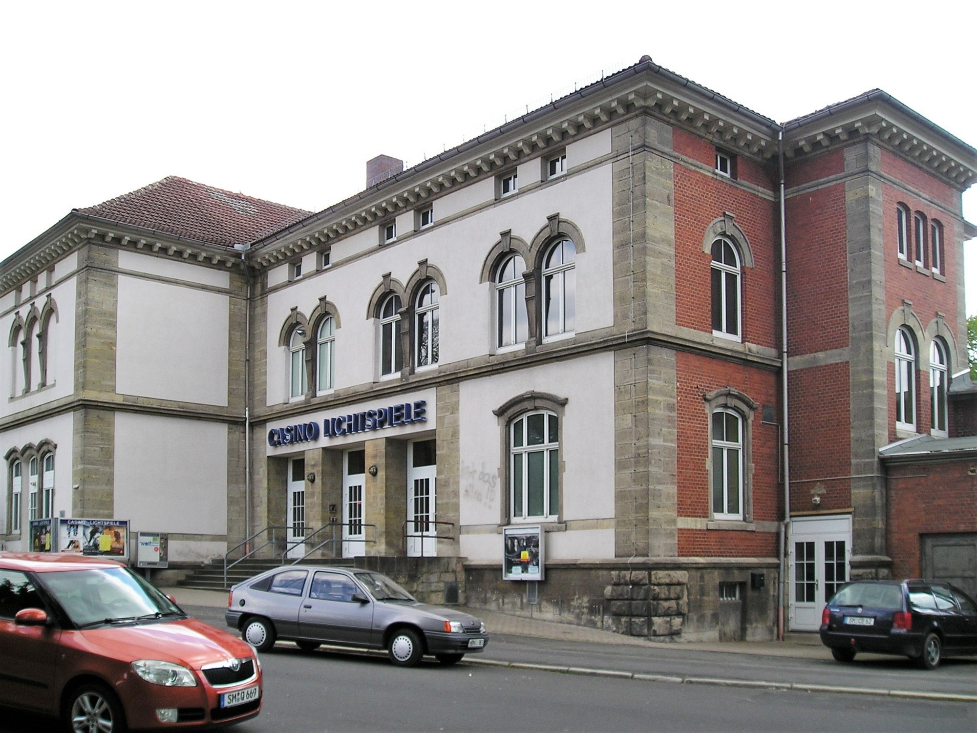 Casino-Lichtspiele in Meiningen, erbaut nach Plänen von Otto Schubert. Heute Multiplexkino mit sechs Sälen